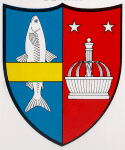 Armoiries de la commune de Bevaix